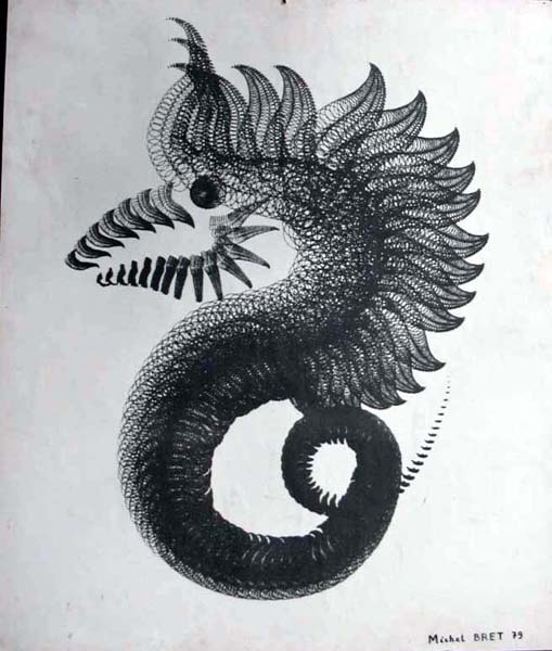 portrait de l'artiste